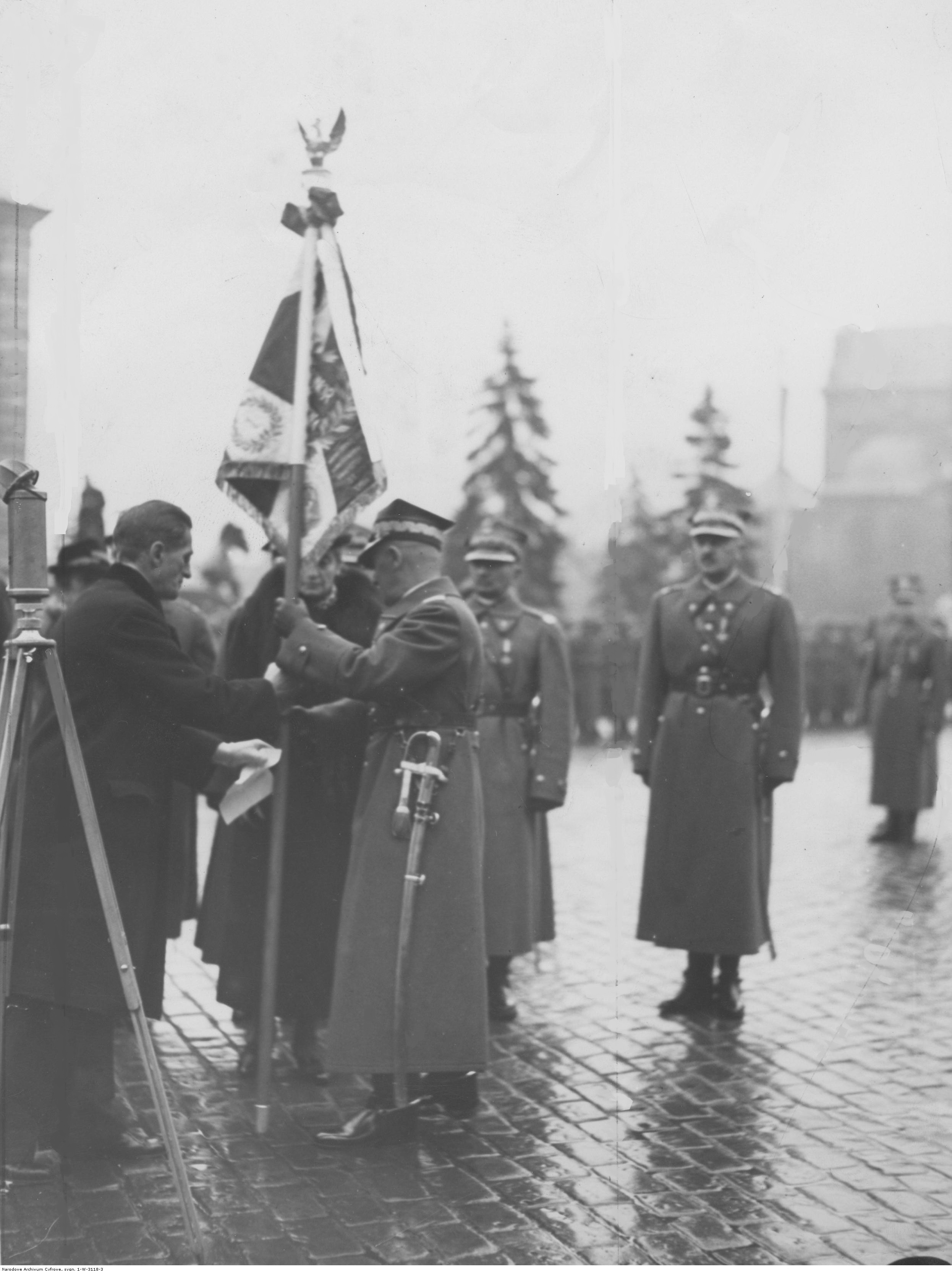 Wręczenie sztandaru, ufundowanego przez ludność ziemi wileńskiej, 1 Pułkowi Artylerii Lekkiej Legionów w Wilnie. Prezydent Wilna Wiktor Maleszewski wręcza, ufundowany przez mieszkańców, sztandar marszałkowi Edwardowi Rydzowi-Śmigłemu. W środku widoczna Aleksdandra Piłsudska. Koncern Ilustrowany Kurier Codzienny - Archiwum Ilustracji. Sygnatura: 1-W-3118-3